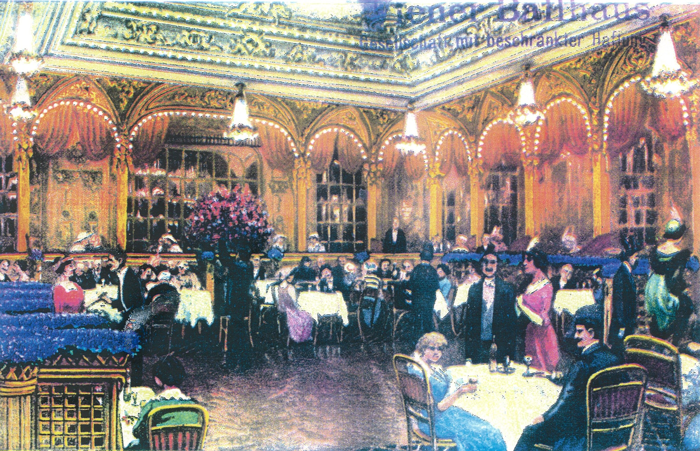 Ballsaal im St. Annahof, Annagasse 3a, Wien Wiener Ballhaus Gesellschaft mit beschränkter Haftung